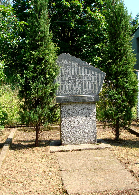 Kamienna Góra, miasto